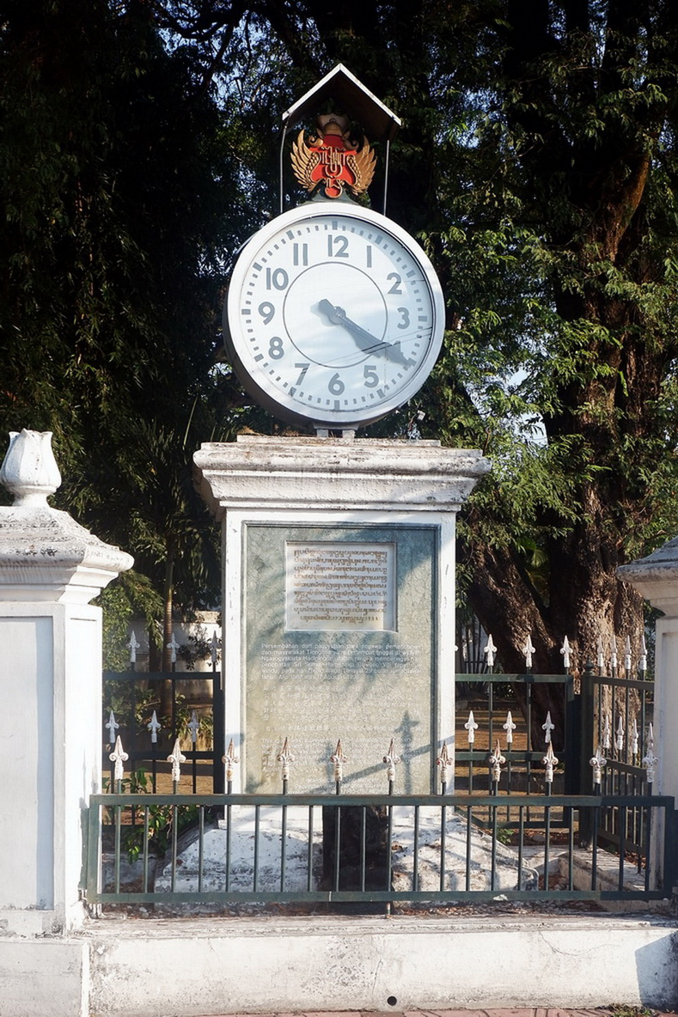 Ngejaman Keben adalah tugu monumen jam untuk mengabadikan hubungan persahabatan antara masyarakat Tionghoa, pegawai gubermen (saat itu adalah pegawai pemerintah Hindia Belanda), dan Keraton Ngayogyakarta Hadinintrat. Monumen yang terdiri atas prasasti dan jam ini sekaligus menjadi penanda semangat kebersamaan antar masyarakat multikultural yang ada di Yogyakarta saat itu. Semangat kebersamaan yang berhasil dirajut tersebut mendapatkan peneguhan dari keraton, yang saat itu dijabat oleh Hamengkubuwana VIII. Monumen ini berada tidak jauh dari pintu masuk wisata keraton dan satu kompleks dengan Masjid Kagungan Ndalem Rotowijayan, tepatnya di Jalan Rotowijayan, Kelurahan Kadipaten, Kecamatan Keraton, Kota Yogyakarta, Provinsi Daerah Istimewa Yogyakarta.